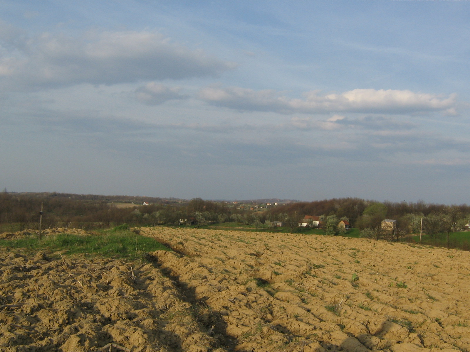 Поглед са Кљајића брда